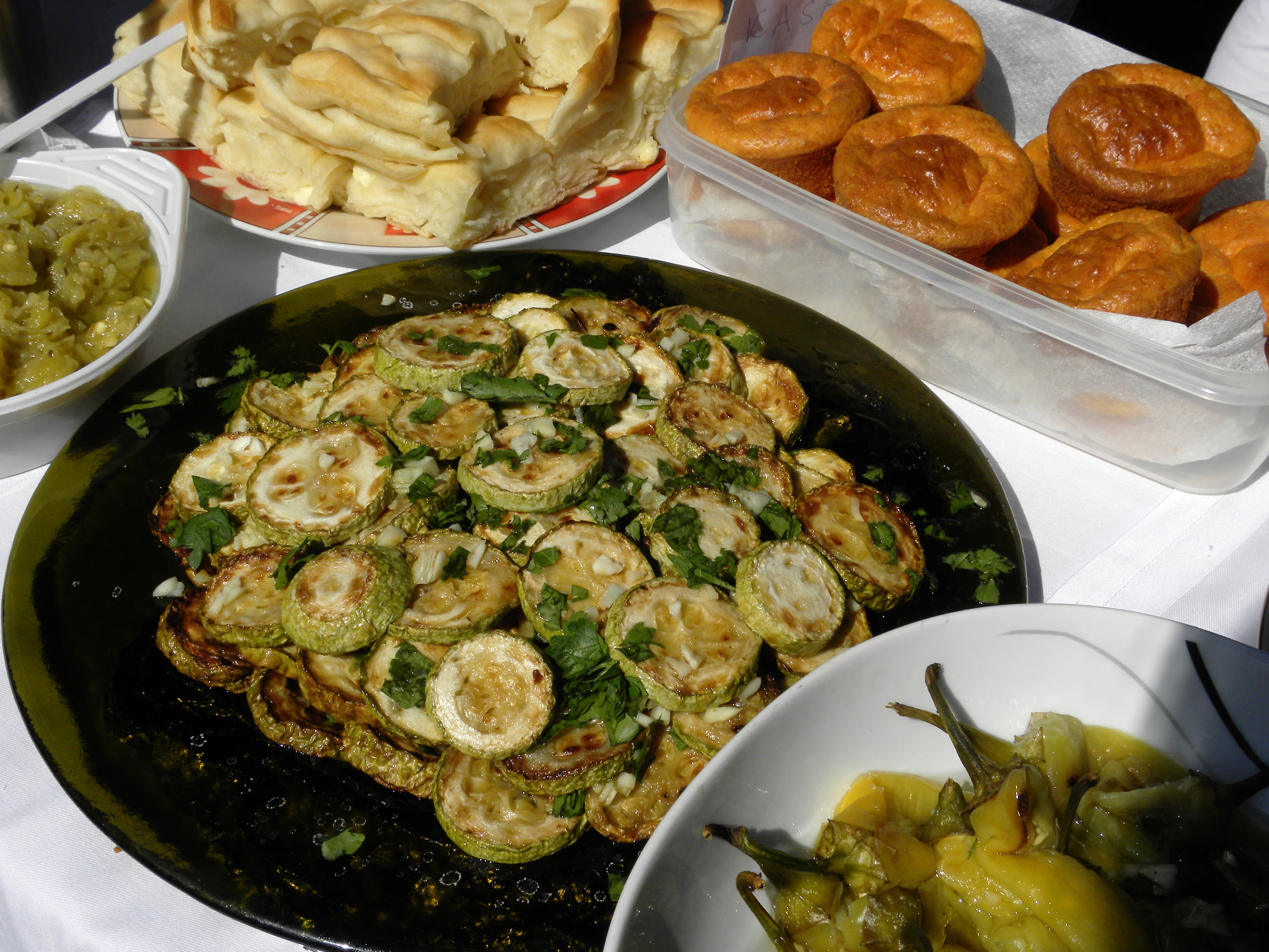 Spezialitäten aus der Makedonischen Küche - angeboten vom Makedonischen Folkloreverein "Makedonia" beim Wasserweltfest 2012 im Vogelweidpark in Wien Rudolfsheim-Fünfhaus